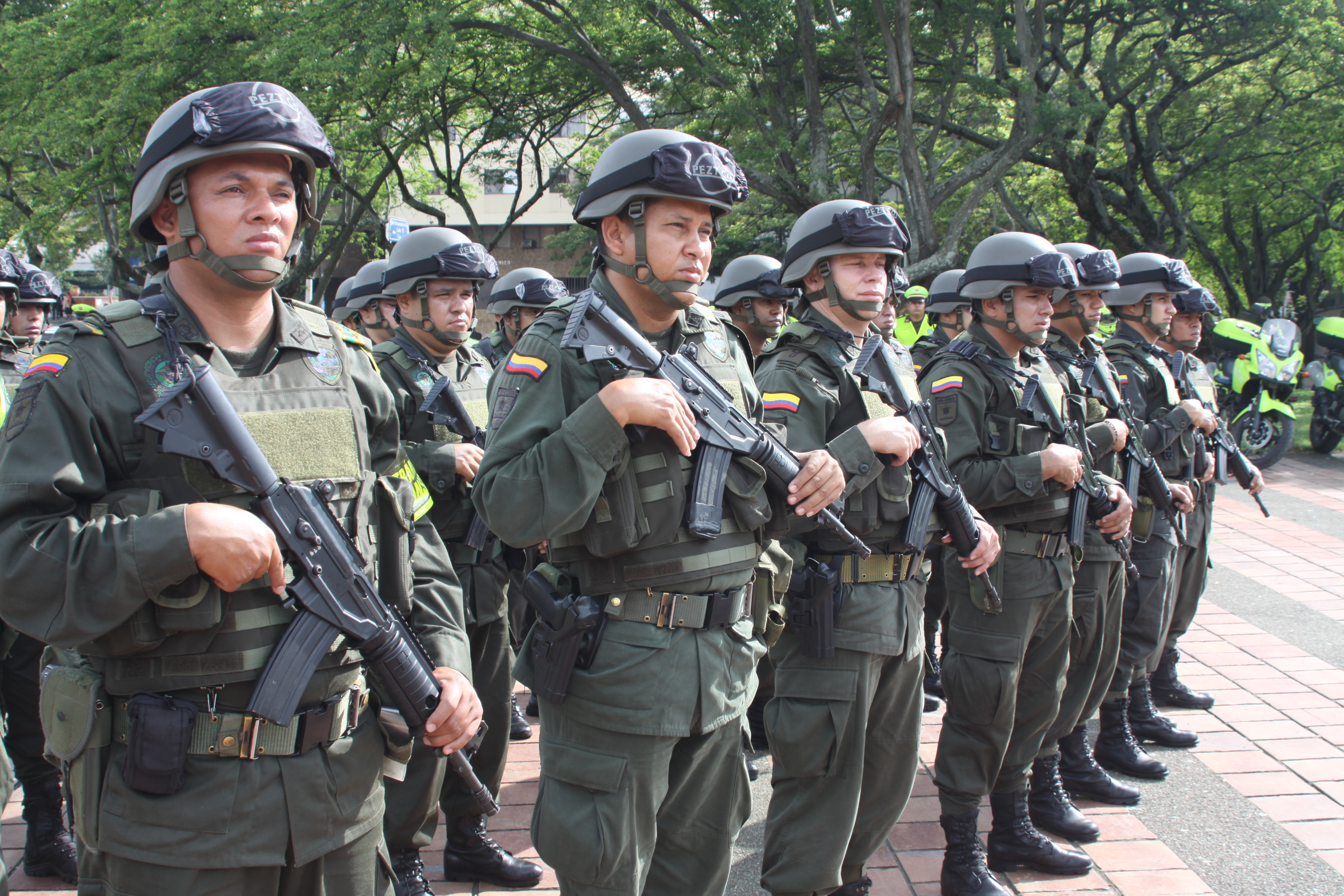 VII Cumbre Alianza del Pacífico